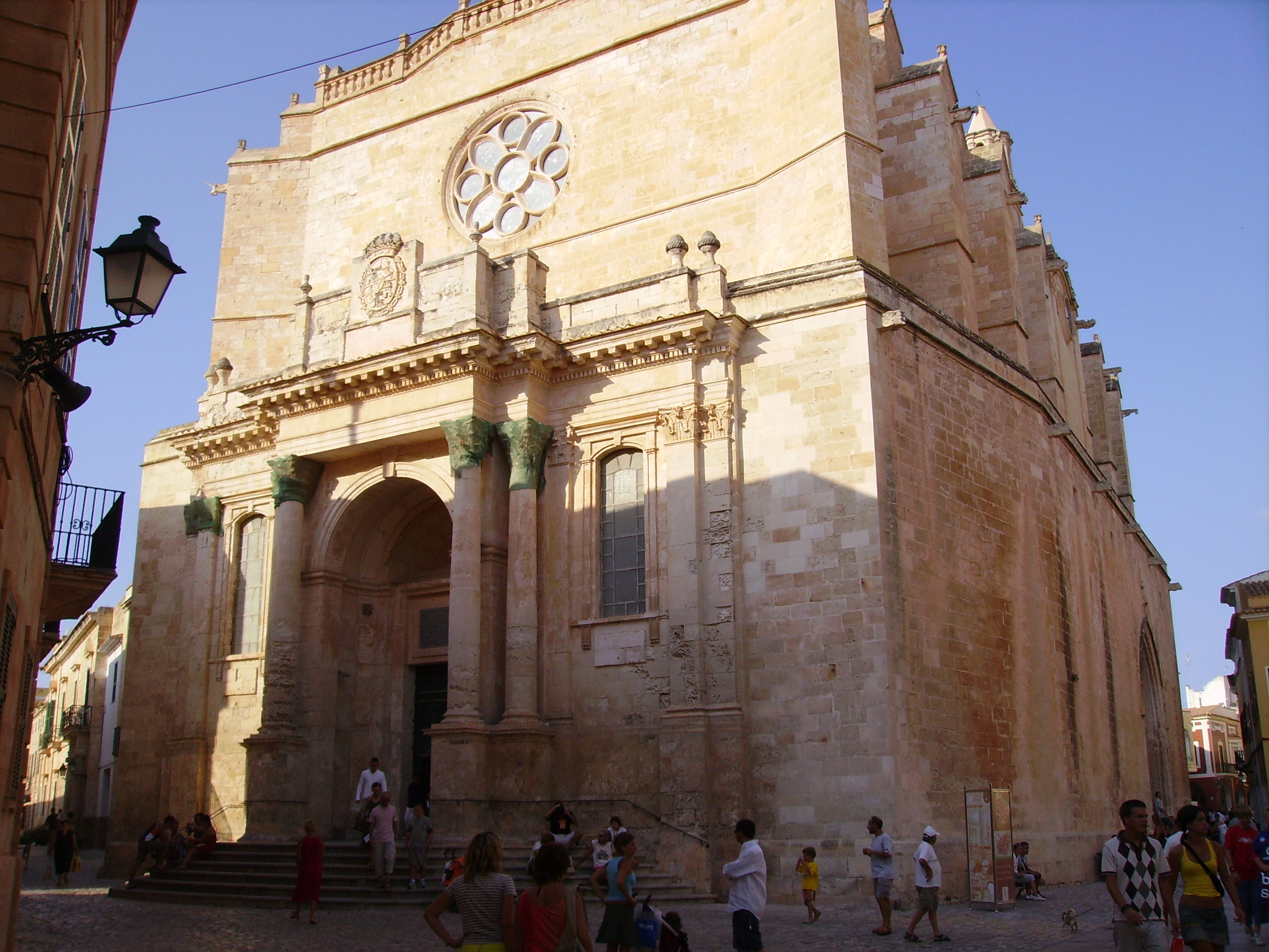 Catedral de Ciutadella de Menorca, Illes Balears.